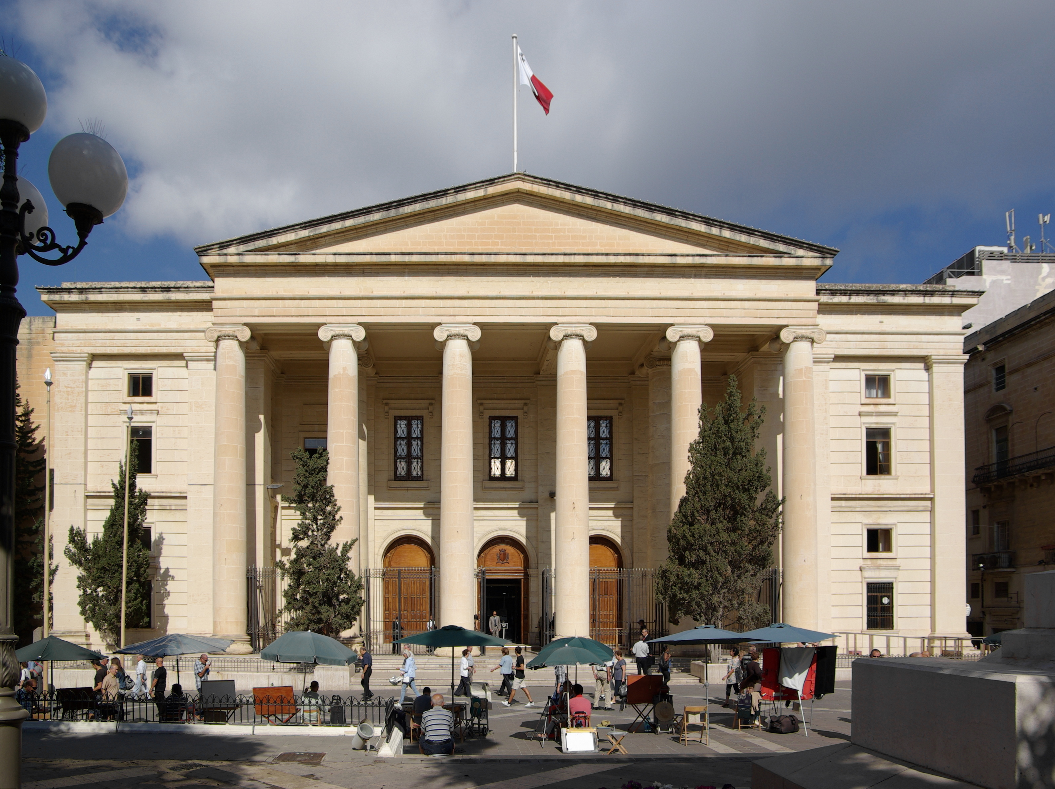 Malta, Valletta, Law Courts